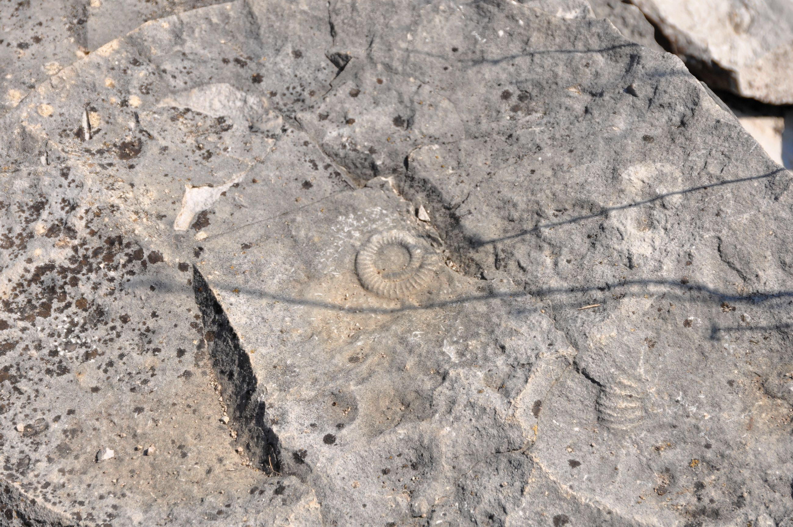 Wikipedia 13. Fotoworkshop; Bilder aus dem Botanischer Garten Erlangen